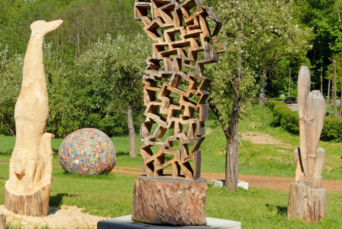 Monastery Scheyern, / Kloster Scheyern, Skulpturenprojekt